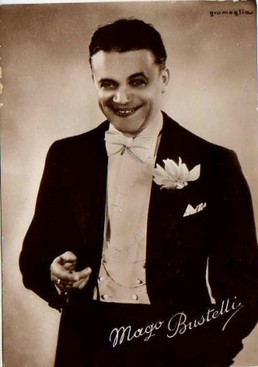 Ranieri Bustelli